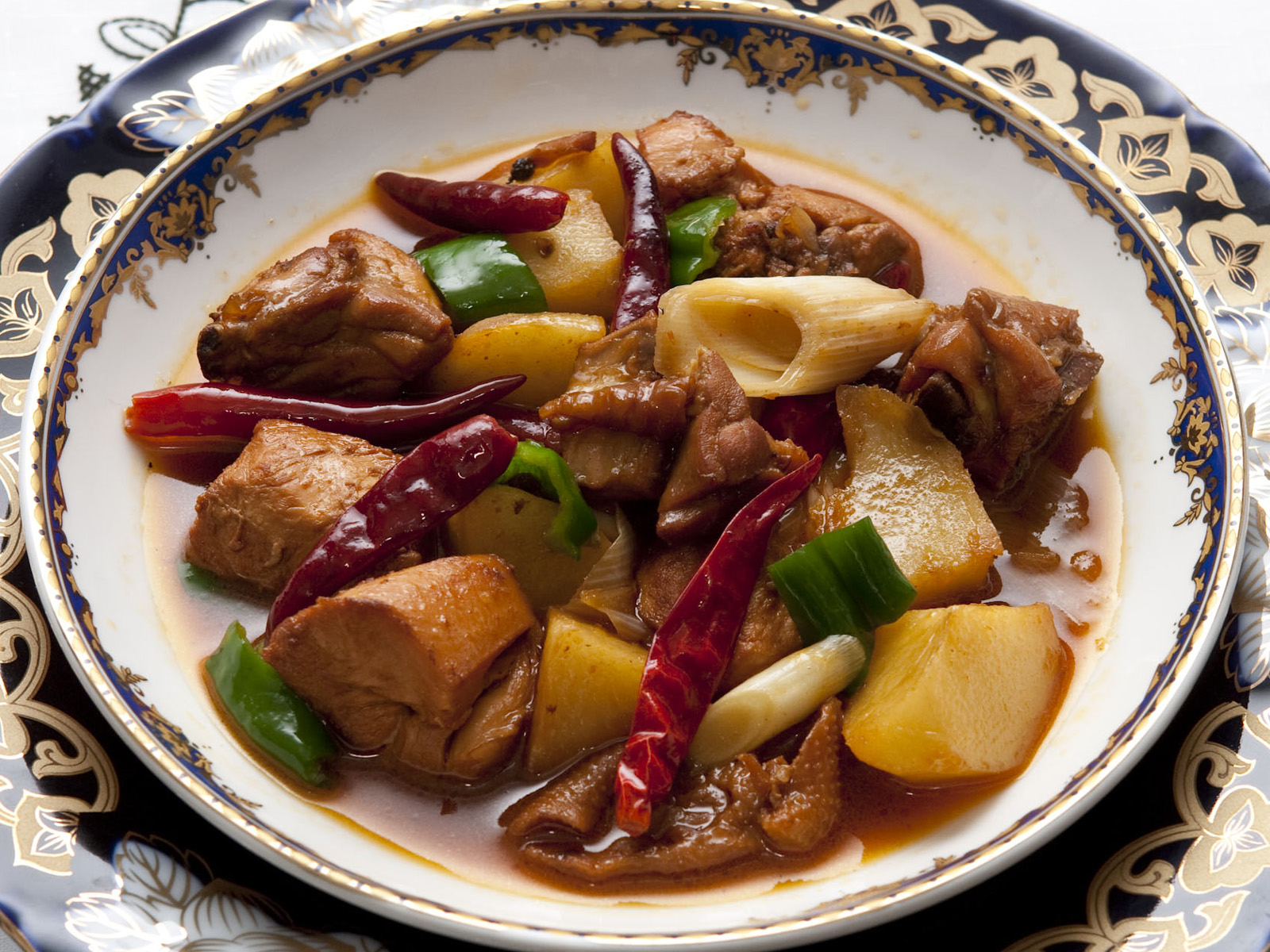 ダパンジ。シルクロード・タリム（東京）調理。